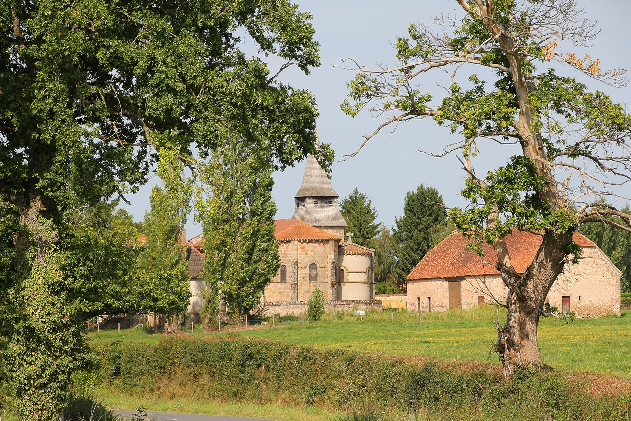 Louroux Bourbonnais Eglise St Martin vue de l'abside